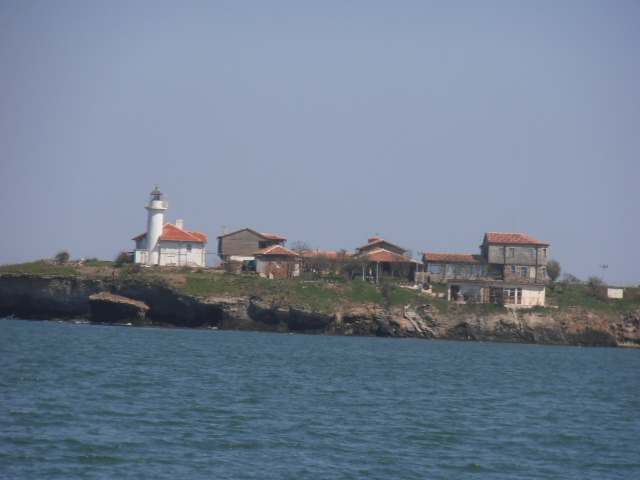 Историческо място, о-в Болшевик